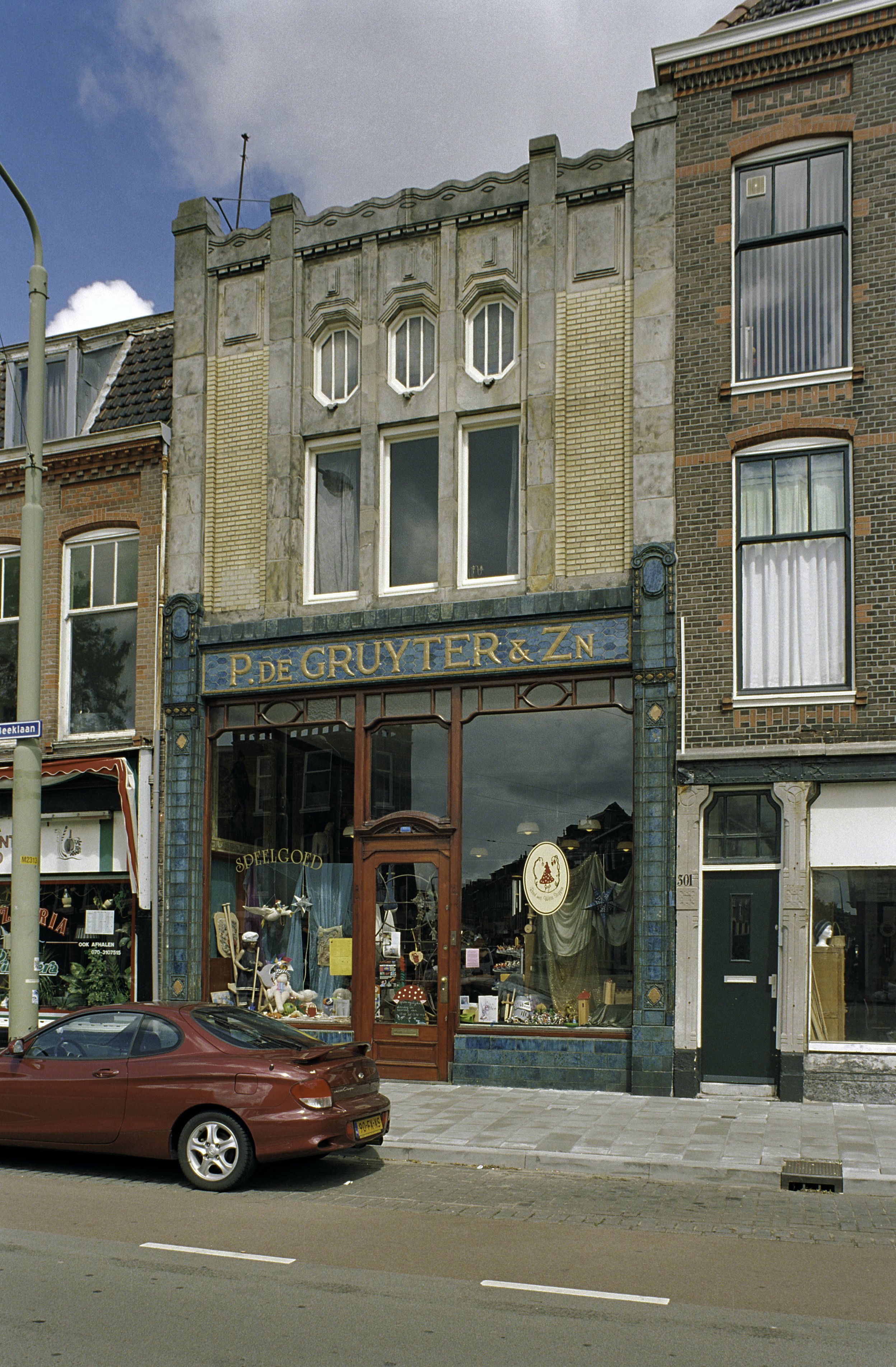 Winkel de Gruyter: Overzicht voorgevel met gebakken tegels, voormalig kruidenier (opmerking: Gefotografeerd voor het Monumenten boek, Karel Loeff, bladzijde 363)